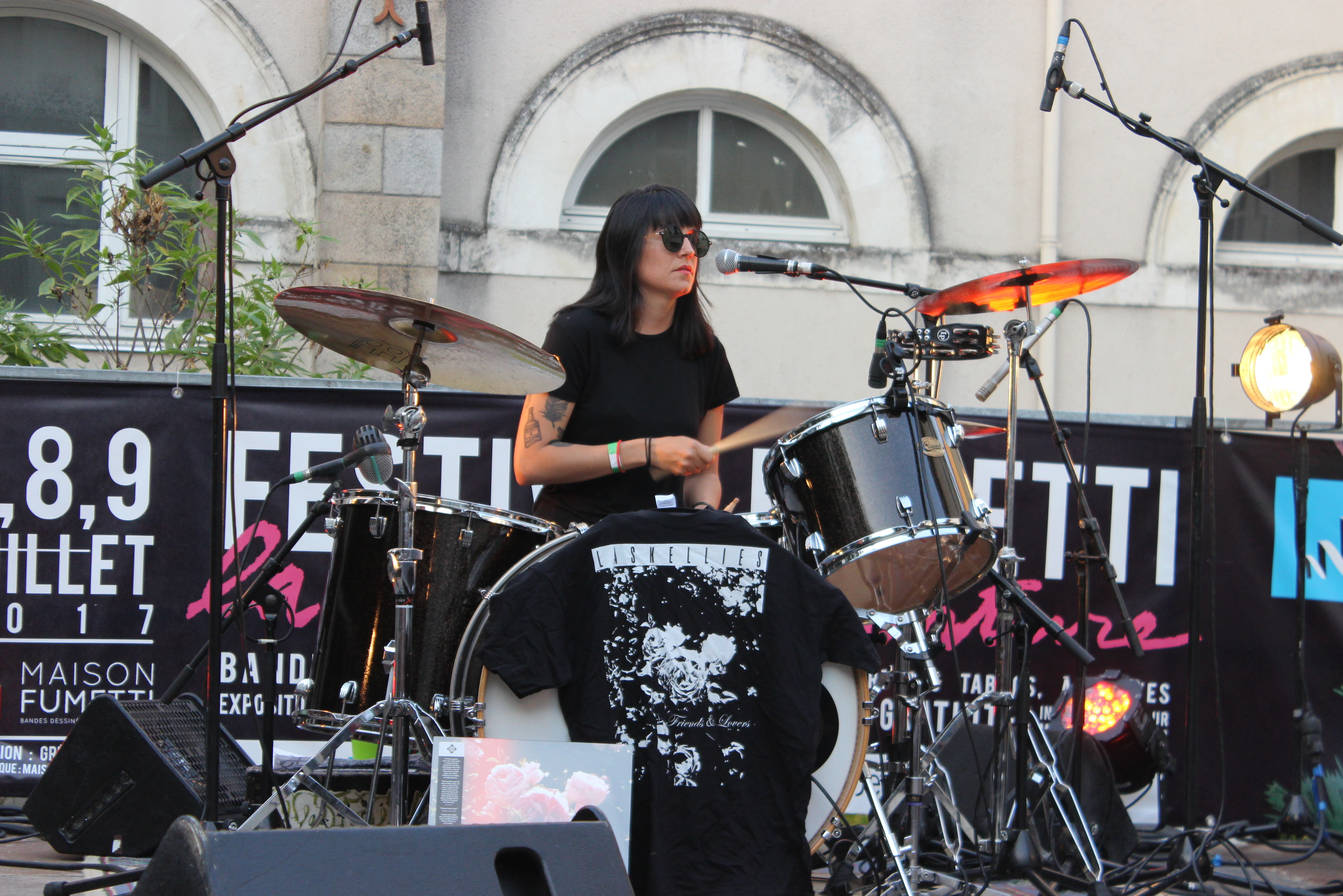 Sil Kelly, percussion et chant du trio argentin Las Kellies lors de la soirée de clôture du festival Fumetti à Nantes, le 8 juillet 2017.